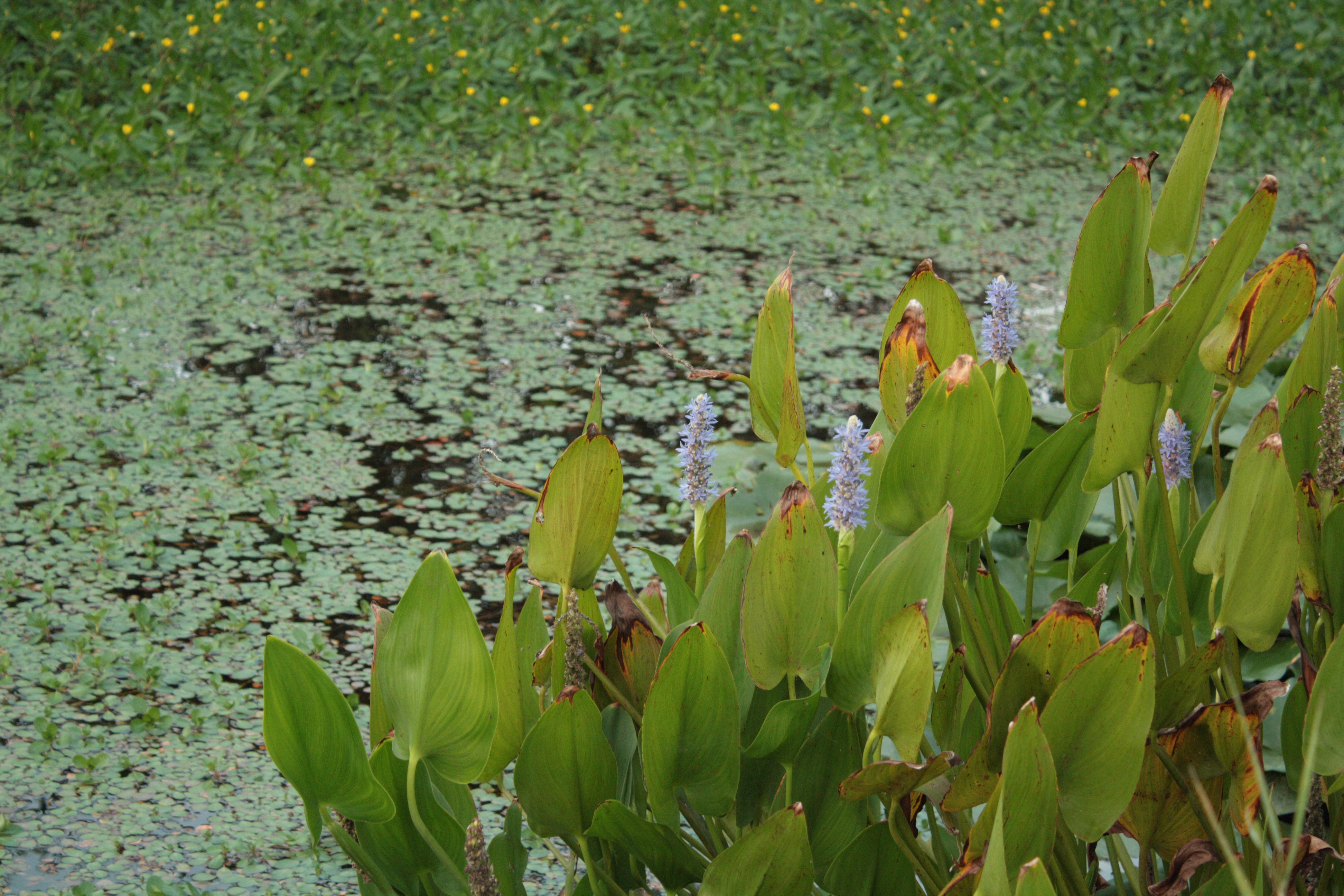 La Francesa This is a photo of a monument which is part of cultural heritage of Italy.